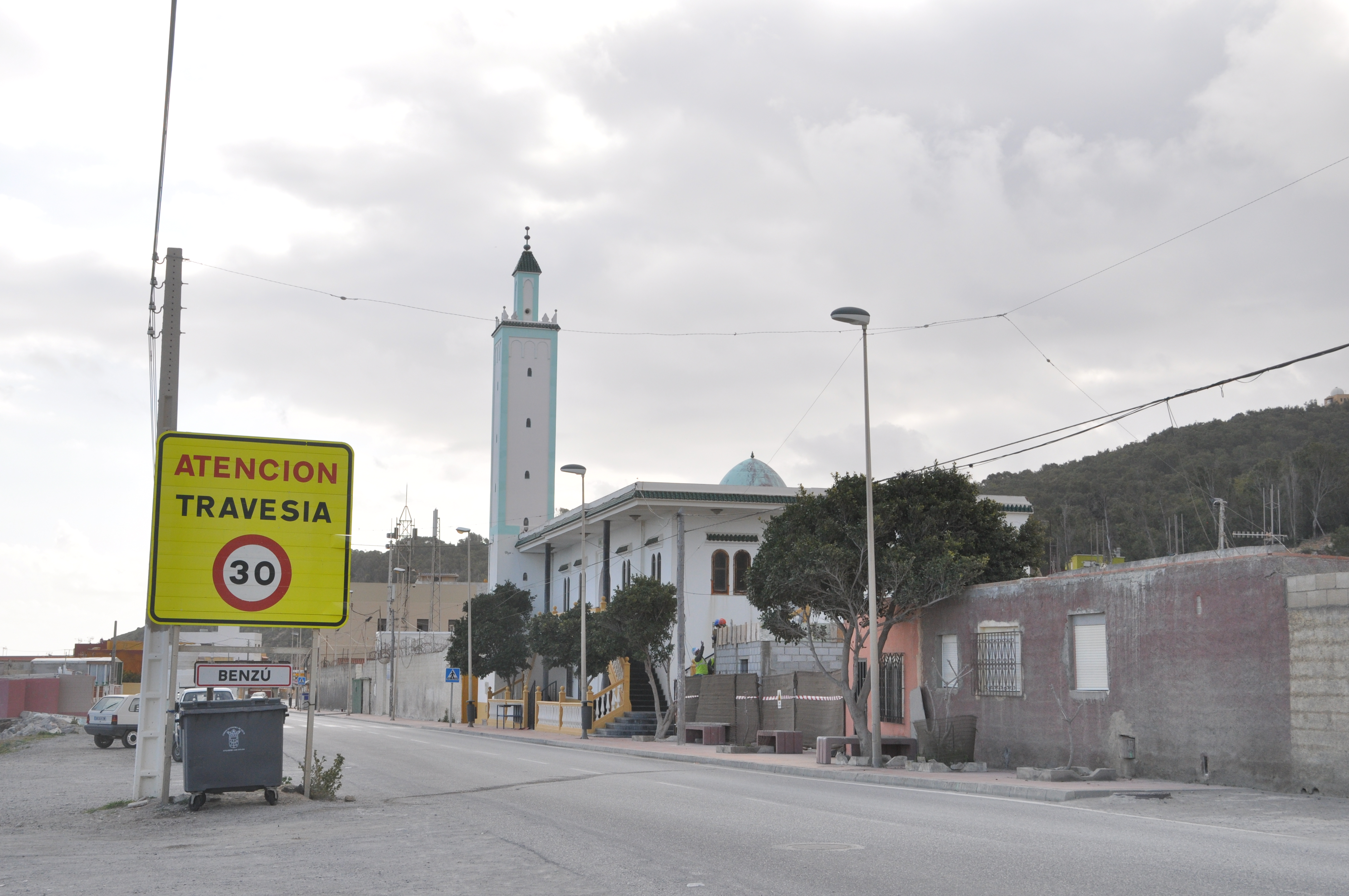 Benzu liegt 7 km von Ceuta